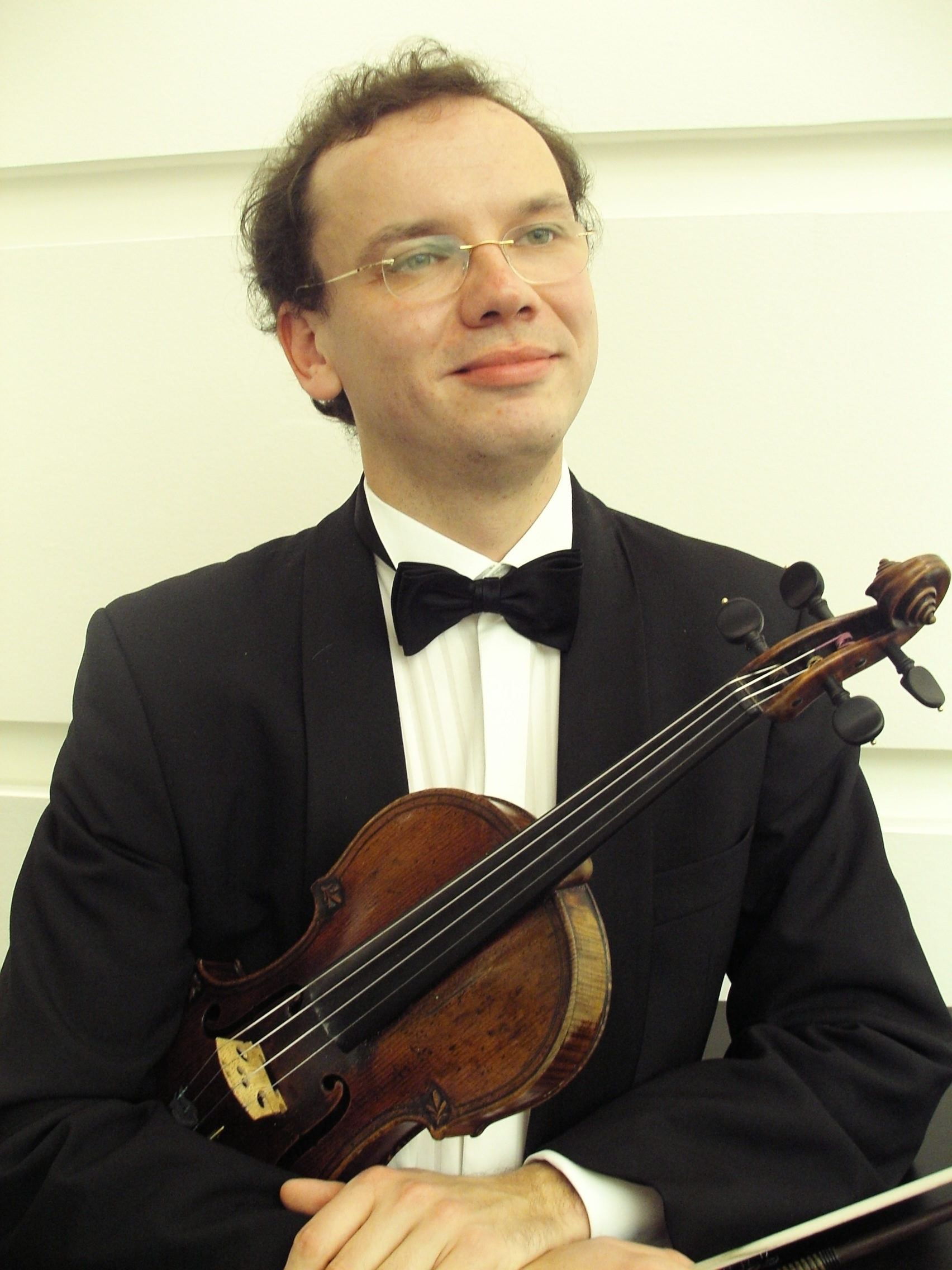 Mikhail Kibardin (* 1974), uzbekish violinist